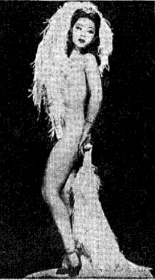 Noel Toy